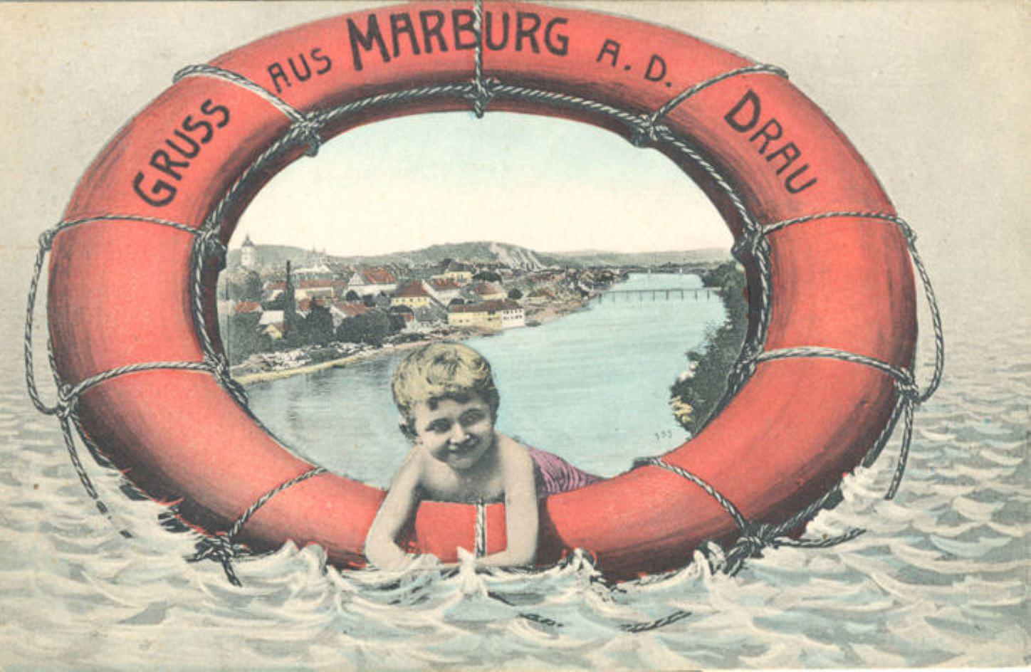 Razglednica Maribora.